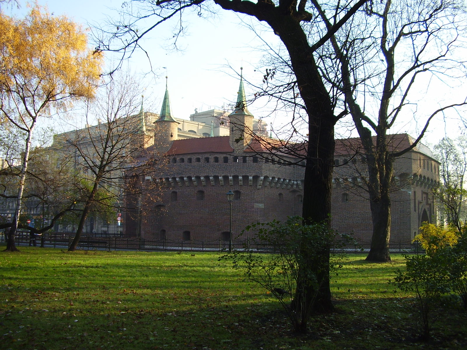 Krakow